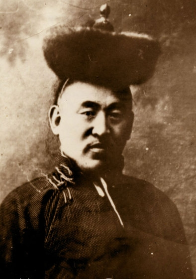 Монгол: Мижиддоржийн Ханддорж